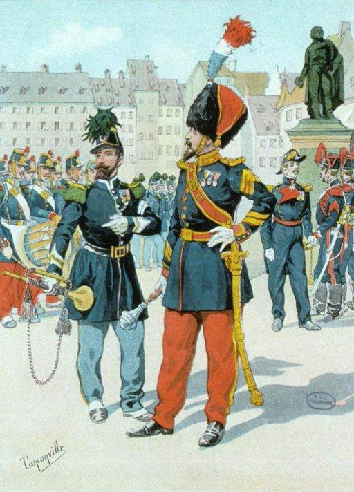 1859. - Der Zapfenstreich der Garnison auf dem Kleberplatz zu Strassburg. 1911. Bibliothèque nationale et universitaire de Strasbourg